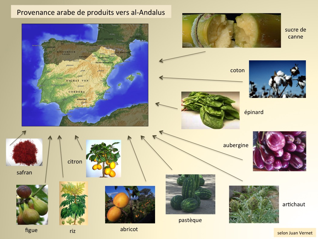 Provenance arabe de produits vers al-Andalus, selon l'historien Juan Vernet ("Ce que la culture doit aux Arabes d'Espagne", 1978/1985). Fichiers utilisés : File:Al-Andalus-de-910.jpg File:CSIRO ScienceImage 10529 Sugarcane and bowl of sugar.jpg File:CSIRO ScienceImage 408 Cotton Bearing Cotton Plant.jpg File:CDC spinach1.jpg File:Eggplant dsc07800.jpg File:Artichauts.jpg File:Pastèques.jpg File:Apricots2.jpg File:Citrus - Meyer-lemon - Tree.jpg File:Rice Paper Plant-Fitch.jpg File:Grappe de figues 2.jpg File:Saffron.JPG